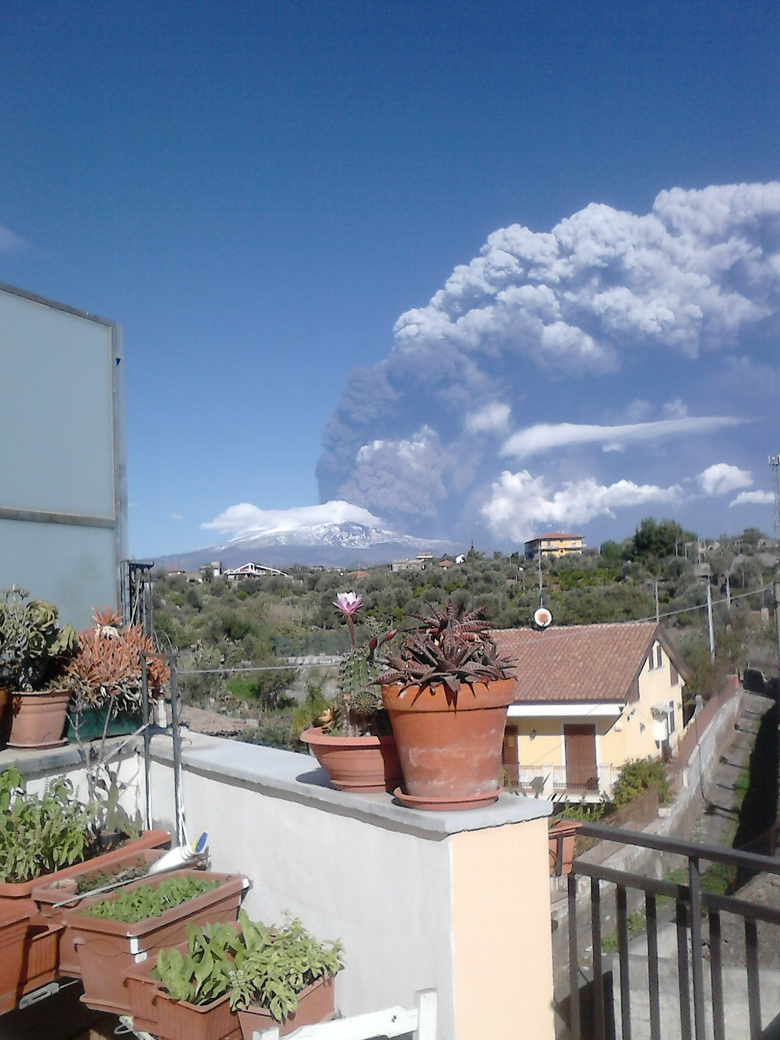 Attività stromboliana con emissioni laviche e prodotti piroclastici caduti sui fianchi orientali del vulcano e che hanno fortemente interessato i comuni di Piedimonte e Linguaglossa e il territorio fino al mare a Letoianni e Giardini.